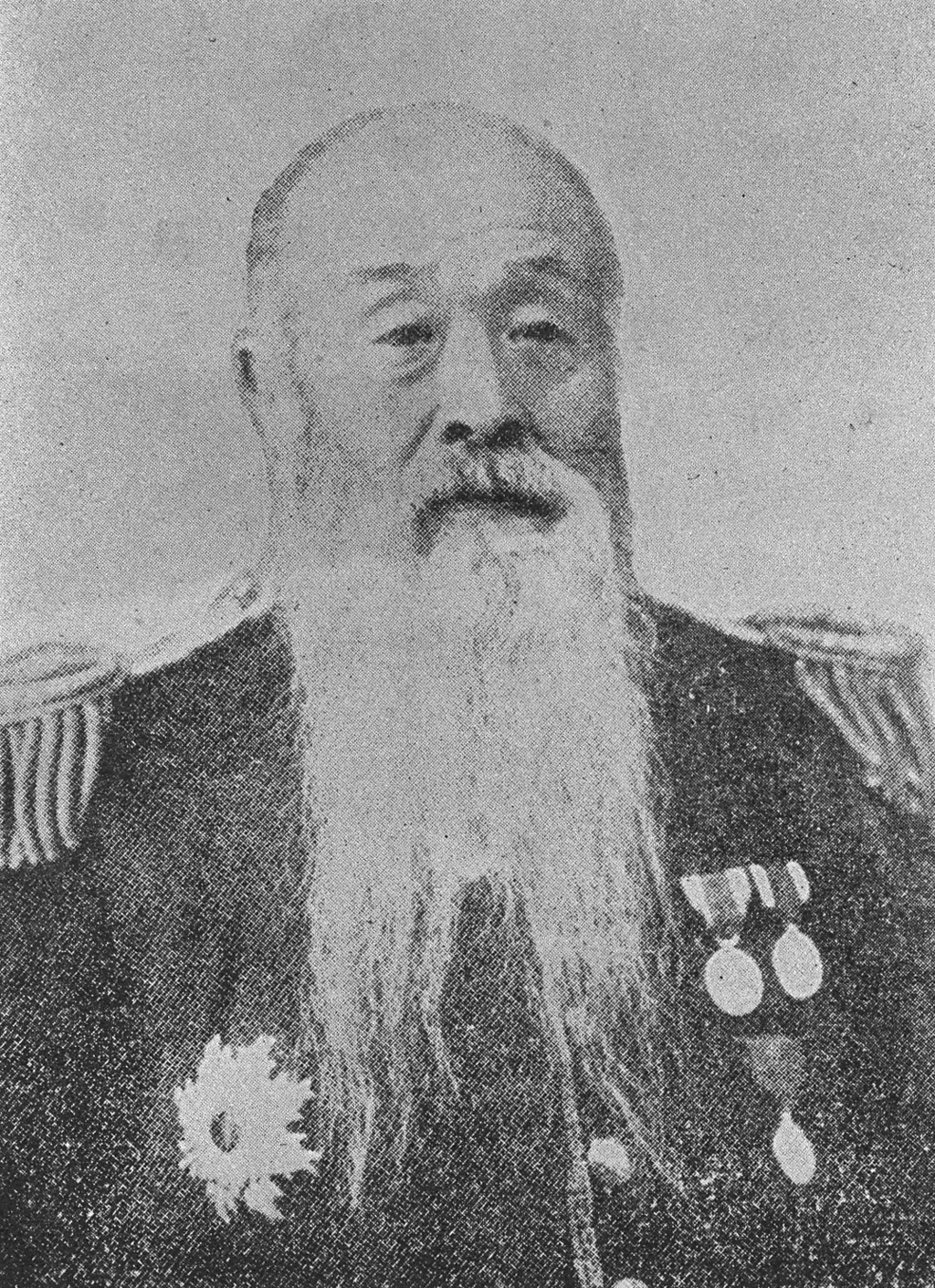 Portrait of Yuri Kimimasa (由利公正, 1829 – 1909)